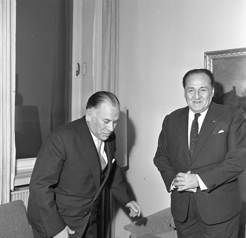 Empfang des peruanischen Regierungsmitglieds, Haya de la Torre, durch den Bundestagspräsidenten Dr. Gerstenmaier Haya de la Torre ist der Gründer der peruanischen Partei ARPA